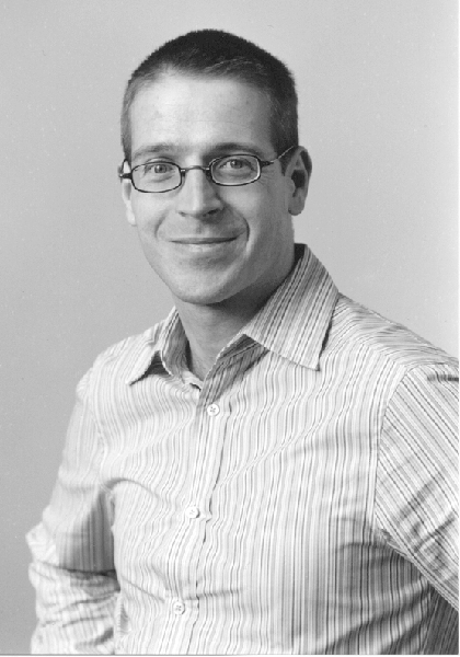 Prof. Dr. Roland H. Stauber